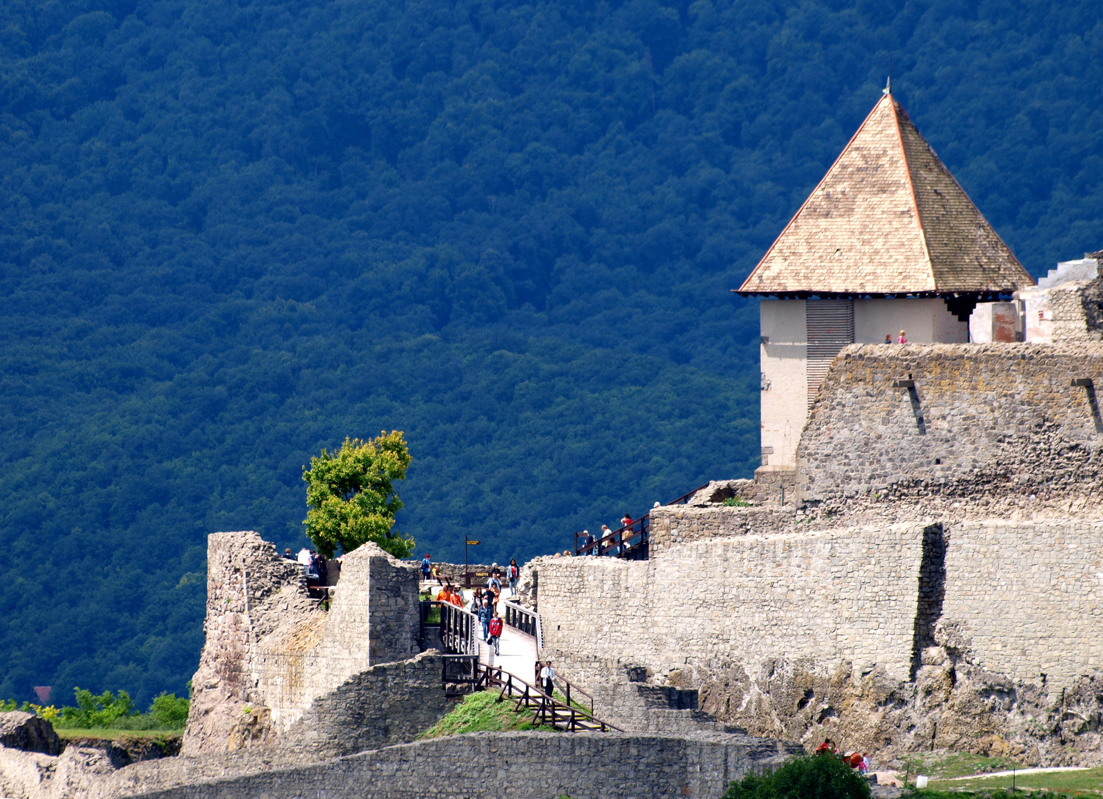 Fellegvár (Visegrád, Várhegy) This is a photo of a monument in Hungary, Identifier: 7612